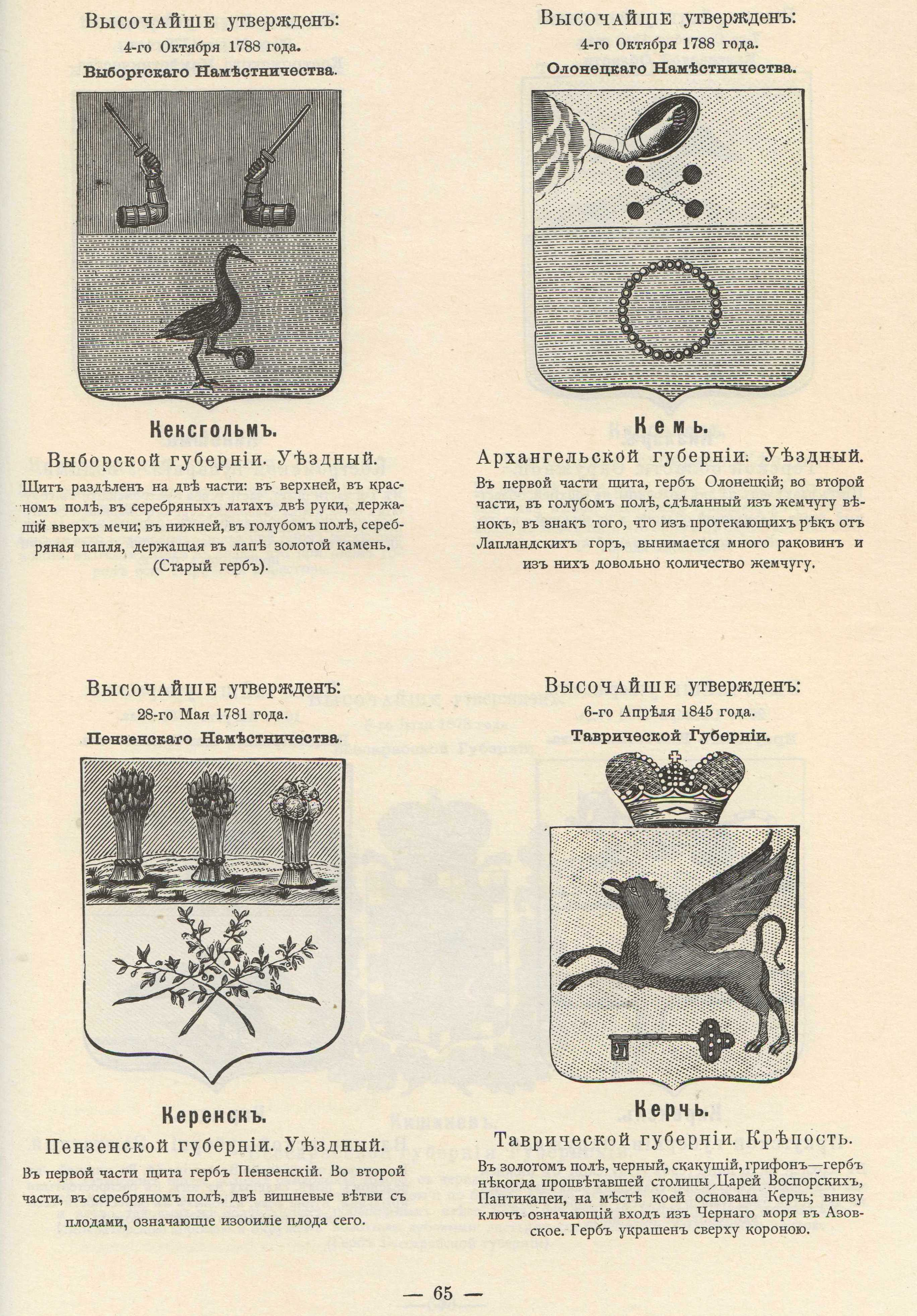 Official Russian Empire coats of arms. Гербы городов Российской Империи Кексгольм Кемь Керенск Керчь с официальными описаниями в Гербовнике Винклера.